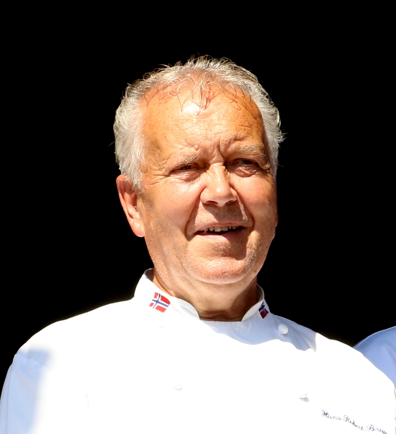 Hans Robert Bruun under Gladmat 2014